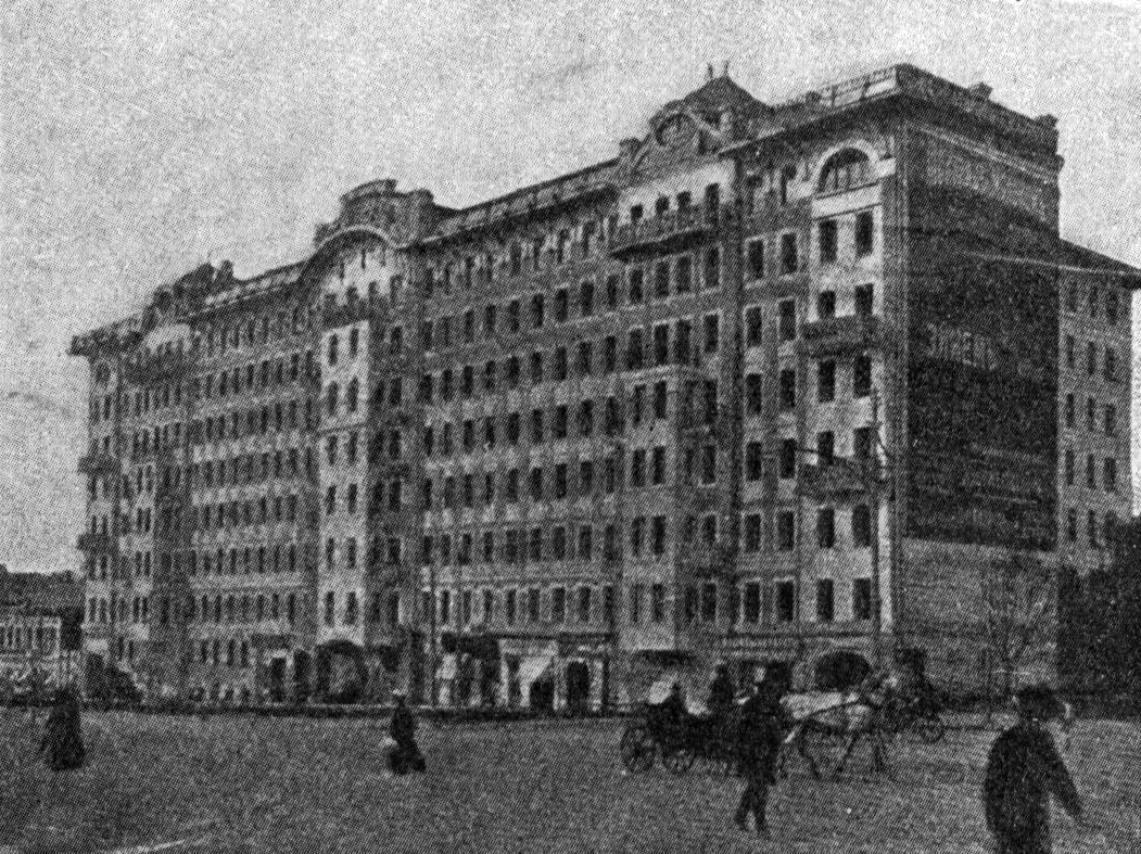 Доходный дом Афремова — доходный дом в Москве, построенный в 1904—1905 годах архитектором О. О. Шишковским для Ф. И. Афремова — один из первых московских «небоскрёбов» начала XX века.